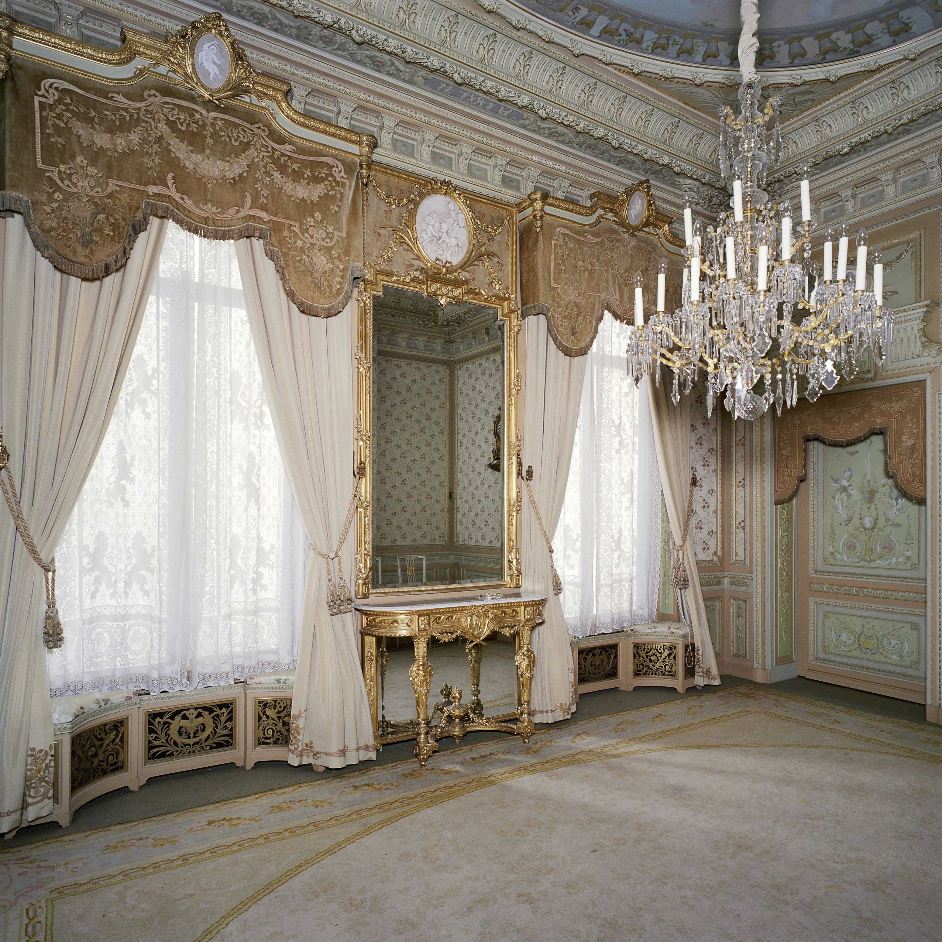 Paleis Soestdijk: Interieur, overzicht van de antichambre met kroonluchter en spiegel, gelegen aan de voorzijde van het corps de logis